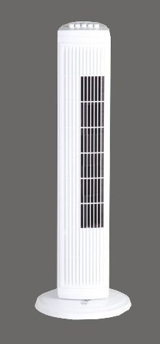 Ventilador de piso blanco